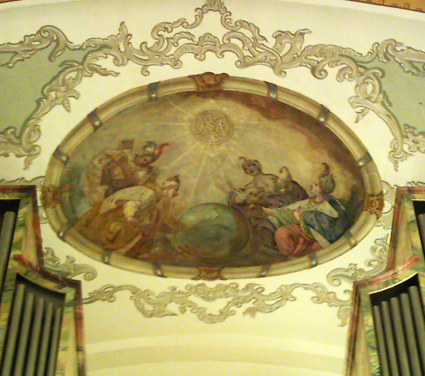 Huldigung Namen Marias in Pfarrkirche St. Martin Tannheim von Chrysostomus Forchner